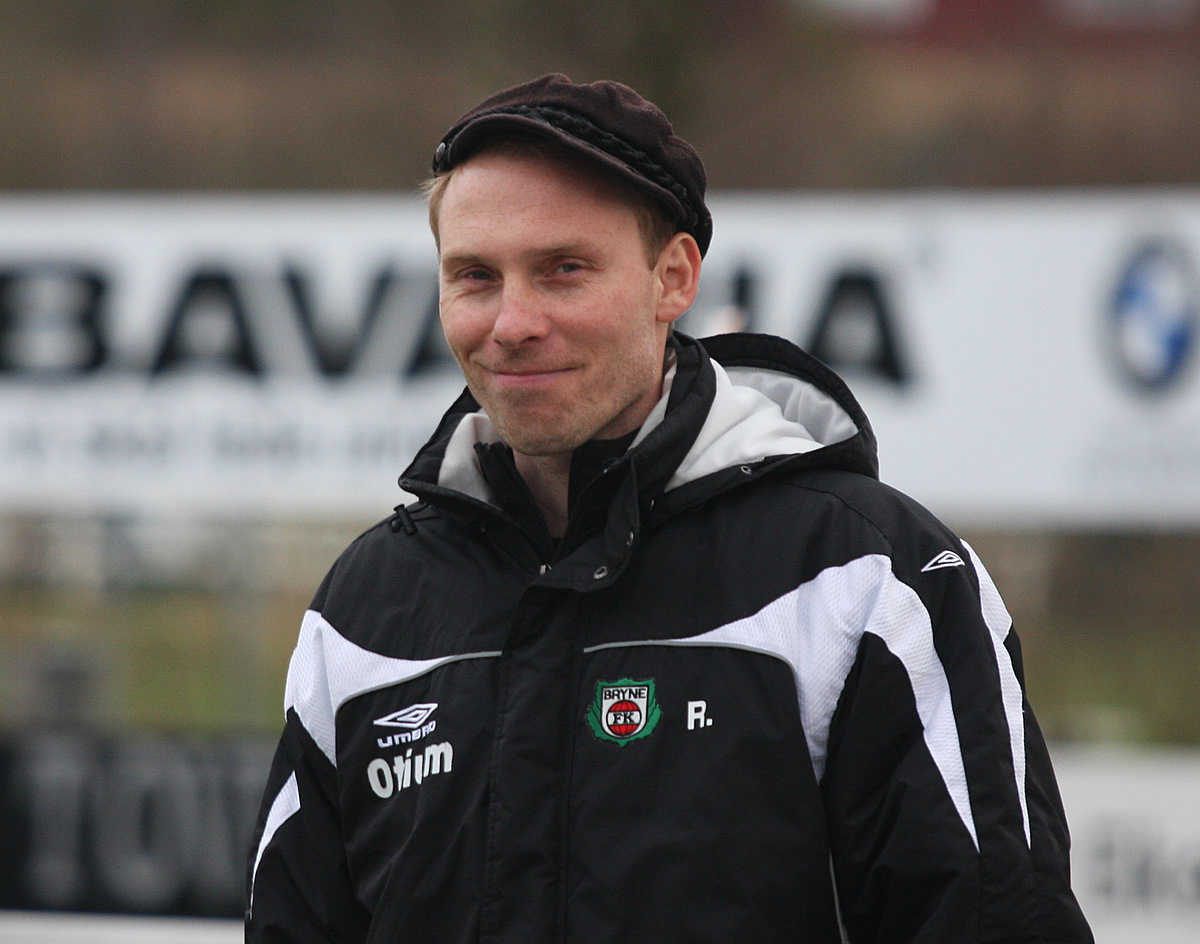 Rolf Teigen, coach Bryne FK